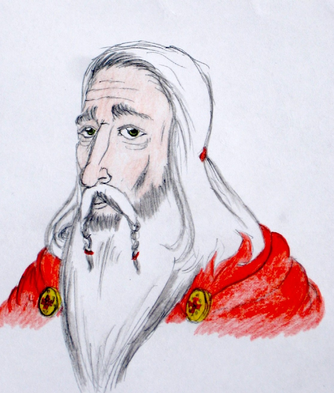 El enano Balin, señor de Moria.